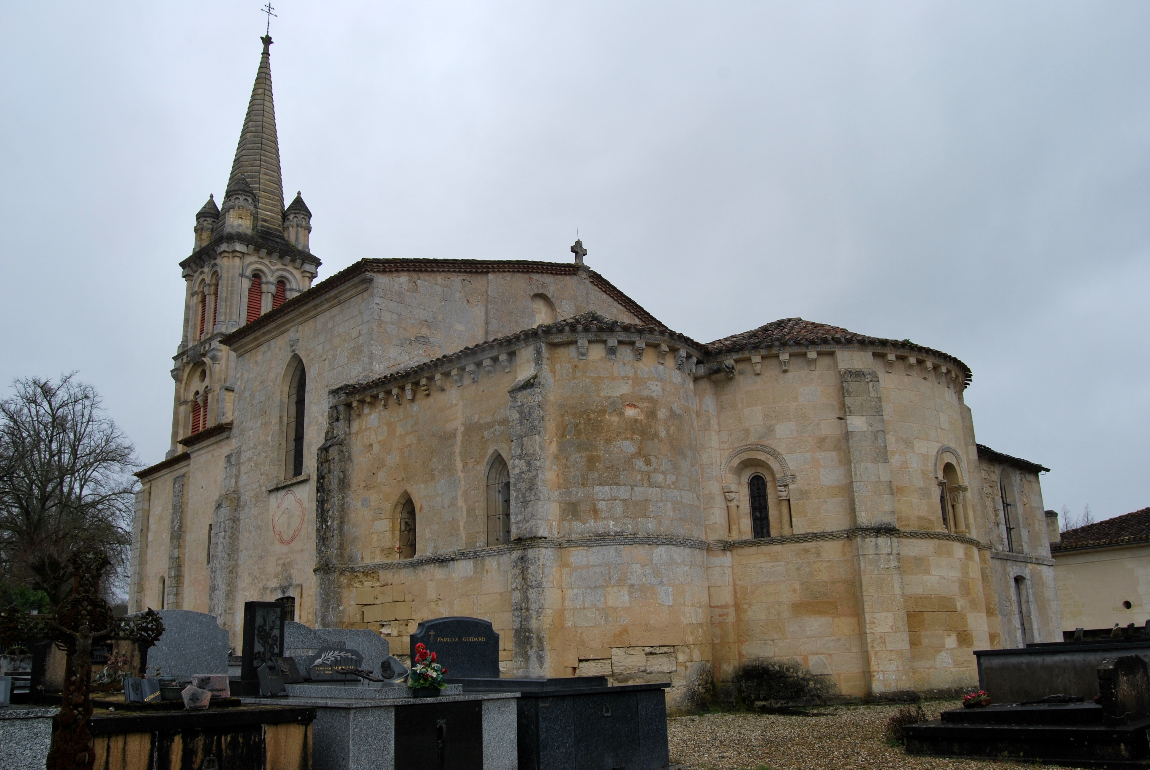 Église Sainte-Eulalie de Lignan-de-Bordeaux